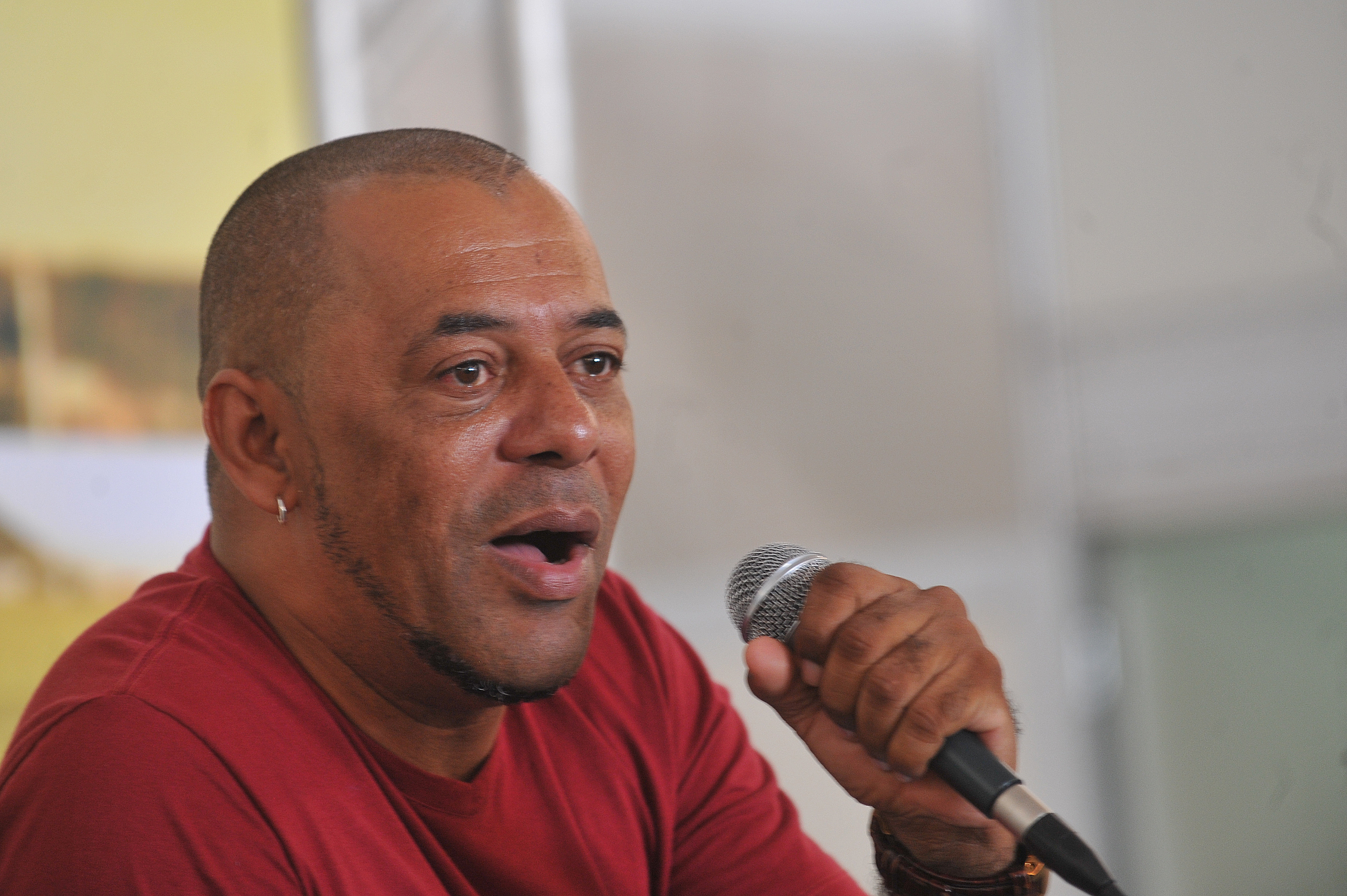 Brasília - O cantor de rap GOG participa de debate sobre literatura periférica na 1ª Bienal Brasil do Livro e da Leitura.